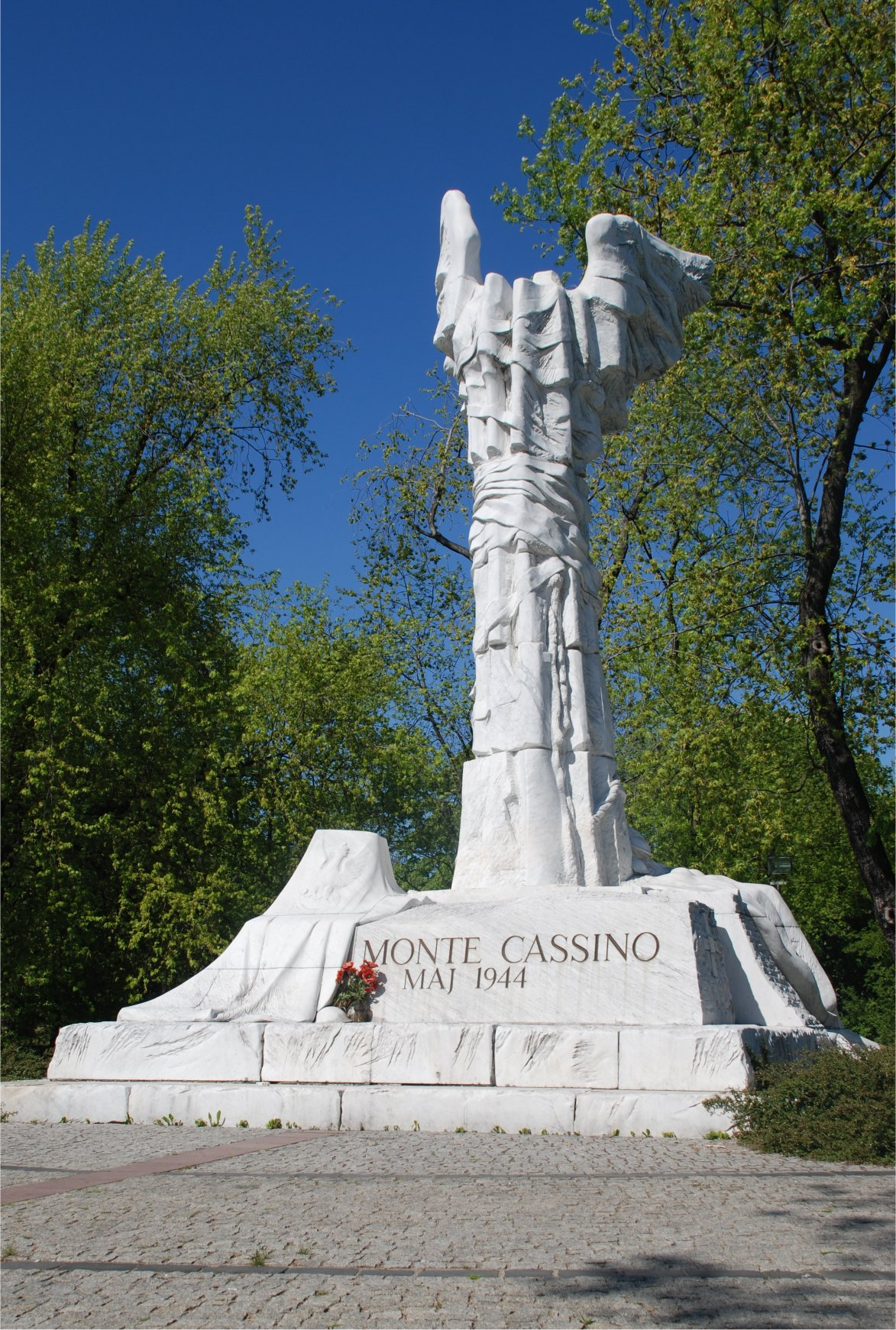 pl wiki